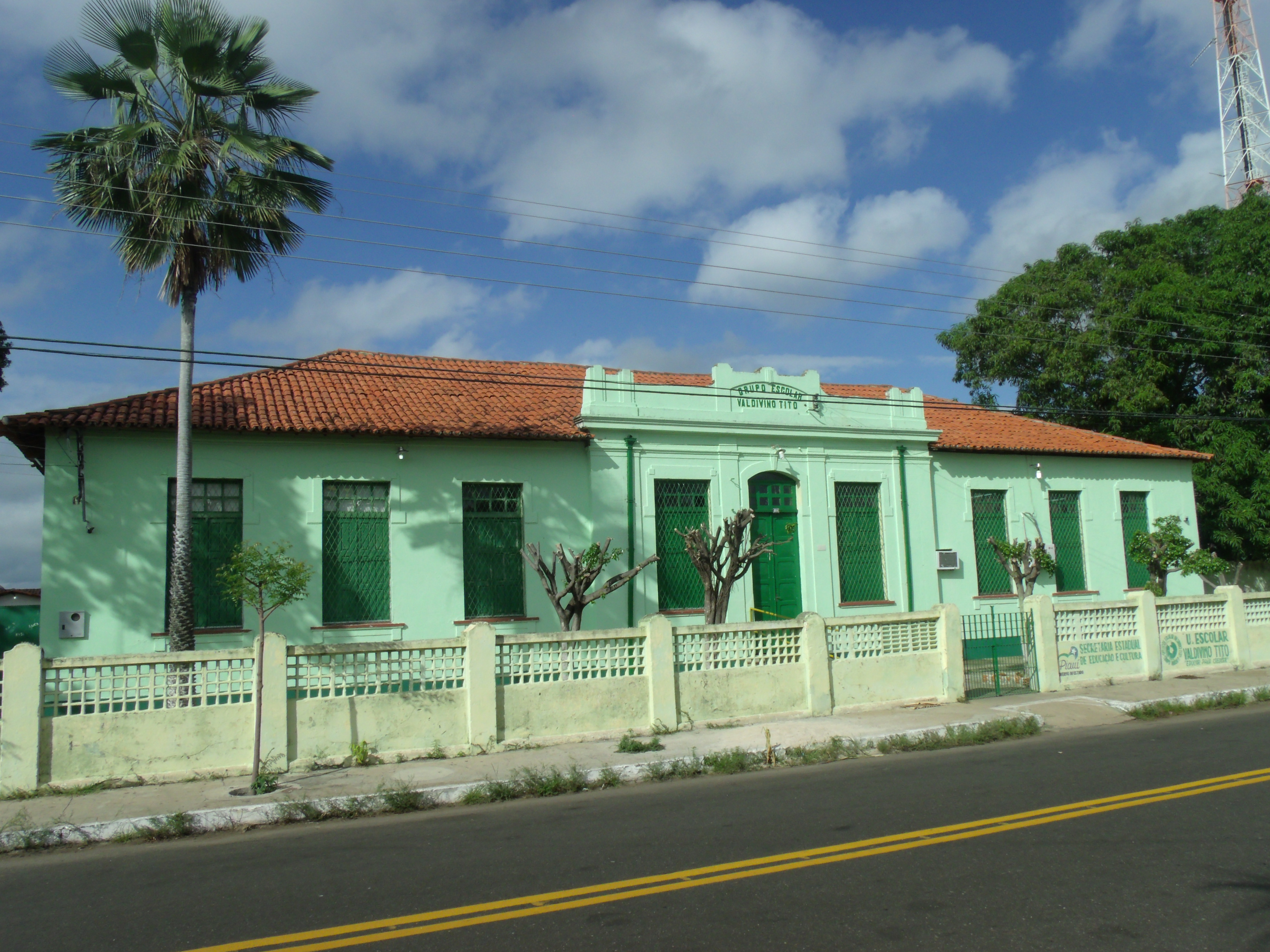 Palacete do Grupo Escolar Valdivino Tito, em Campo Maior, Piauí.